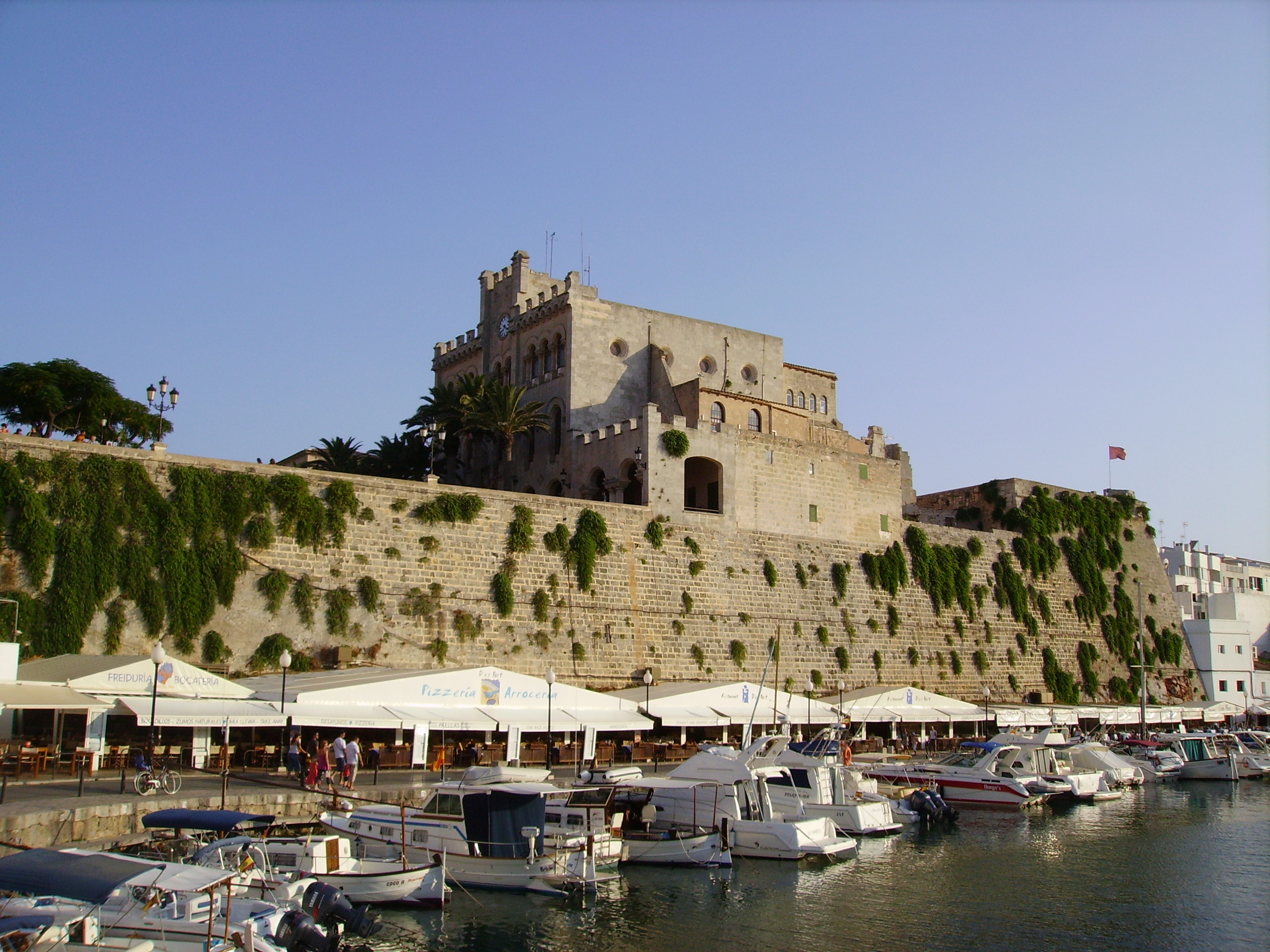 Vista de l'Ajunament des del port, Ciutadella de Menorca, Illes Balears.